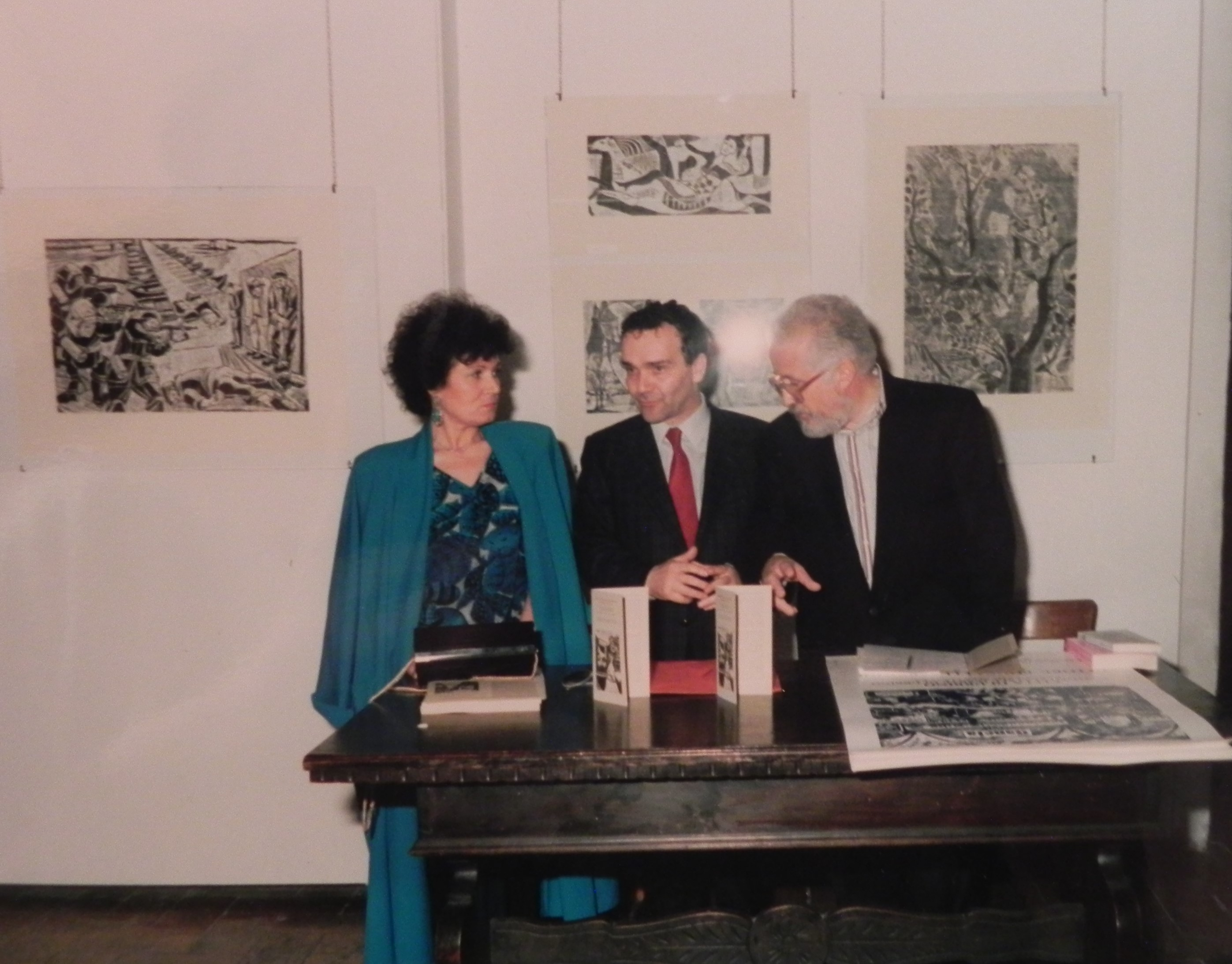 Mostra nel Giardino d'inverno del Palazzo ducale di Urbino, a cura dell'l'Istituto Statale d'Arte Scuola del Libro, 1988. A sinistra la moglie dell'artista, Eugenia Pizzasegola, al centro l'allora preside dell'Istituto Liventi e l'allora sindaco di Urbino